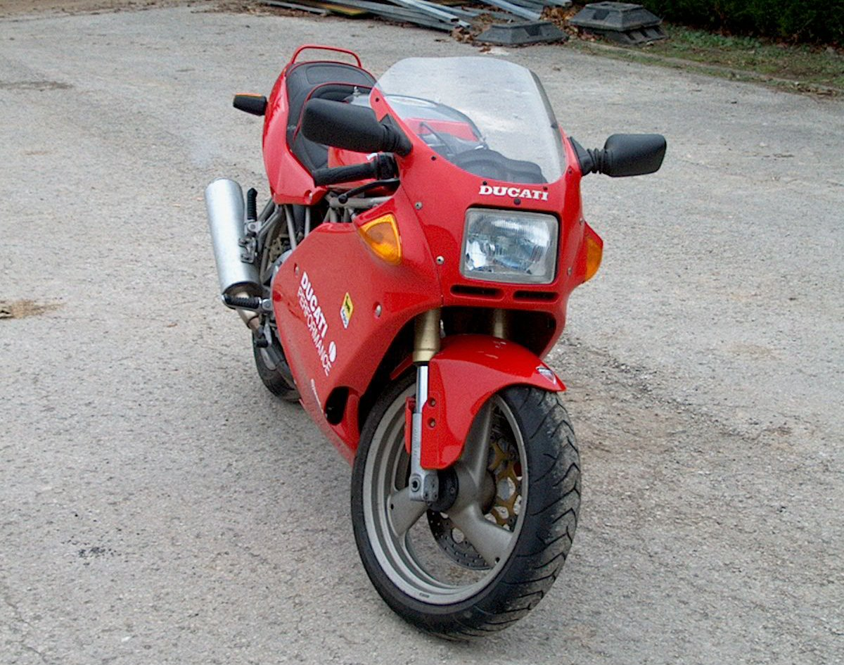 Ducati 600 Supersport face